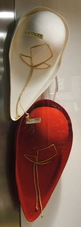 Deux chapeaux de la Goliardia en vitrine dans un magasin de Padoue.